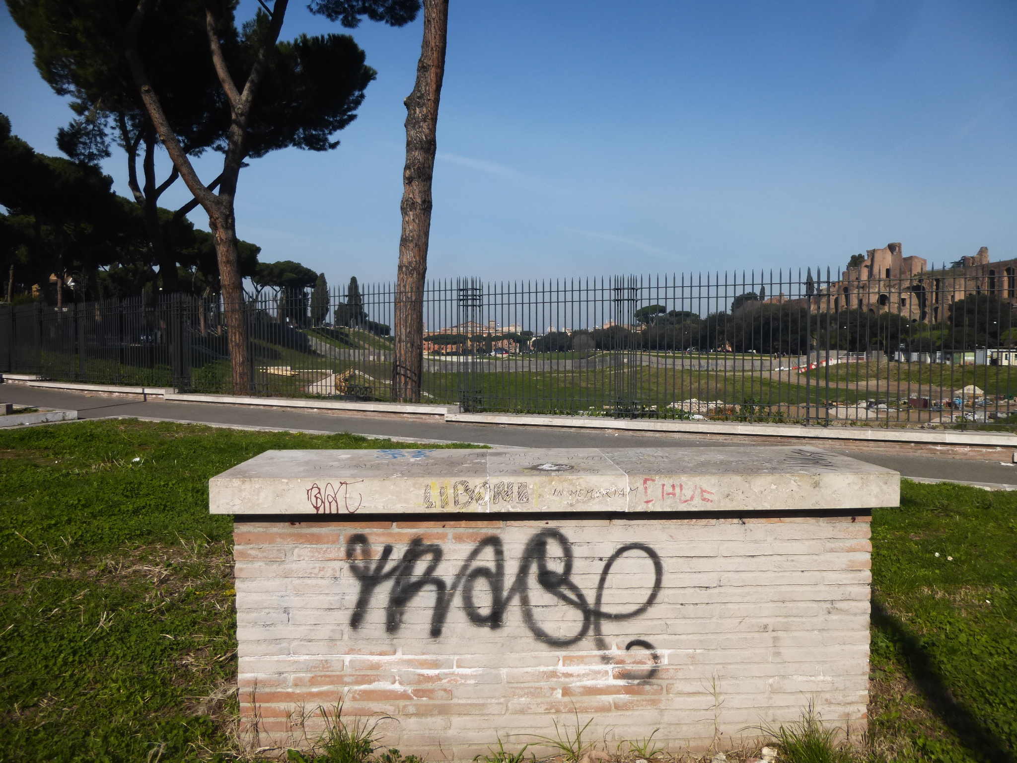 Roma, Circo Massimo. Memoria (popolare) di Luciano Liboni nel luogo dove fu sparato il 31 luglio 2004.